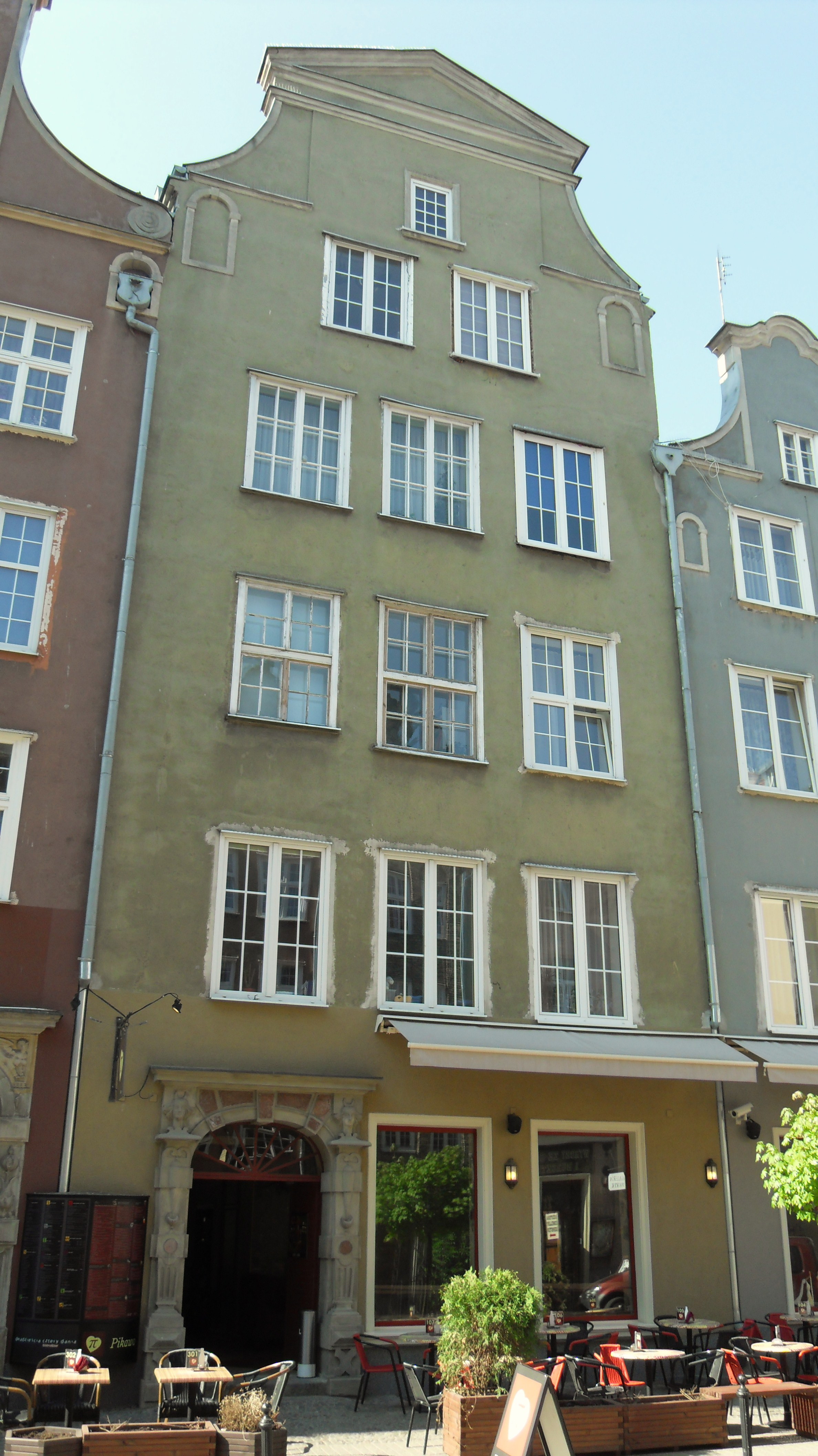 Gdańsk Główne Miasto, ul. Piwna 15 (zabytek nr rejestr. 743)